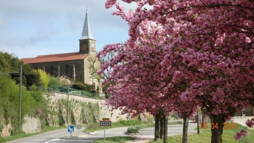 Entrée du village de Bren